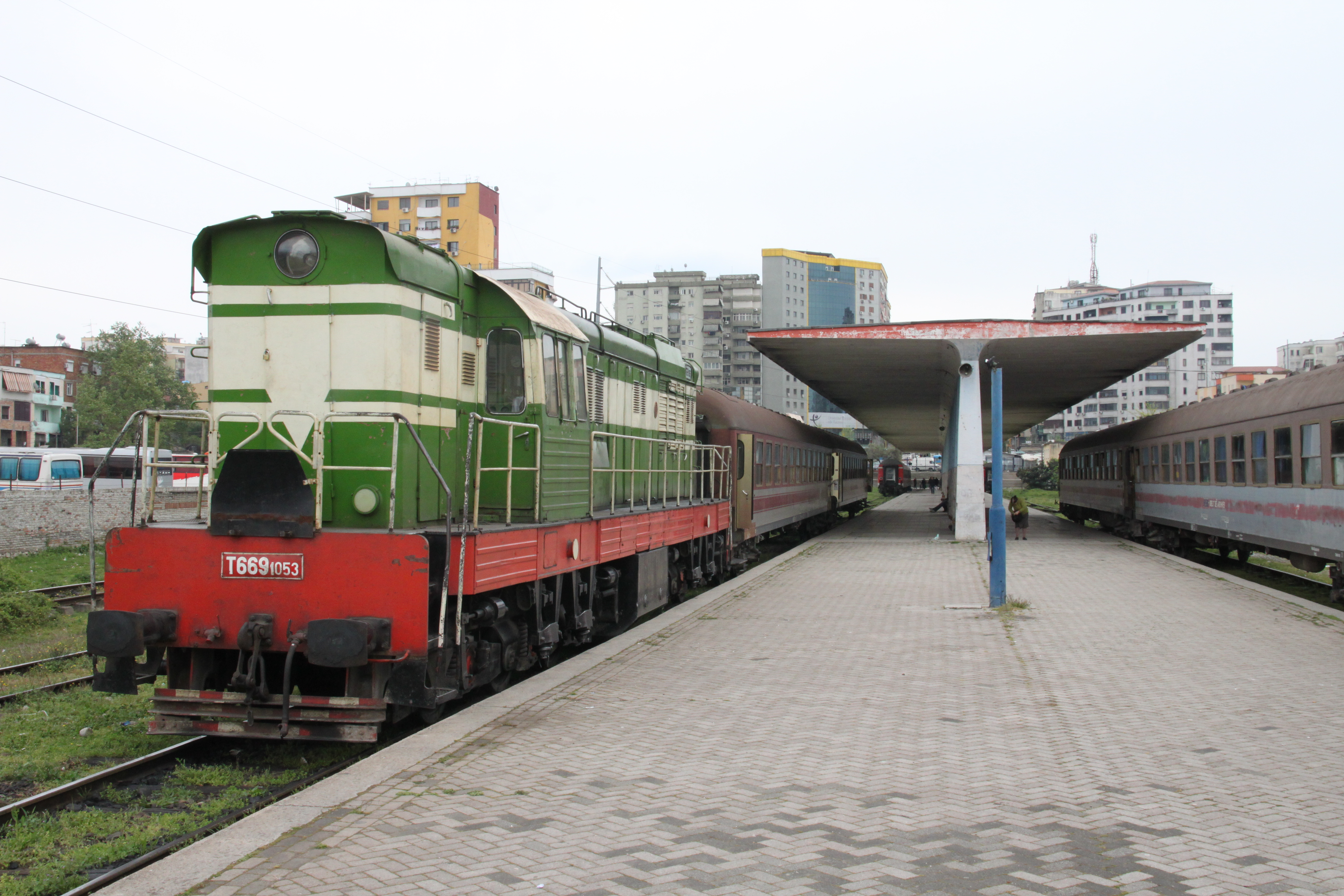 Lokomotiva albánských státních drah HSH na nádraží v Tiraně, Albánie